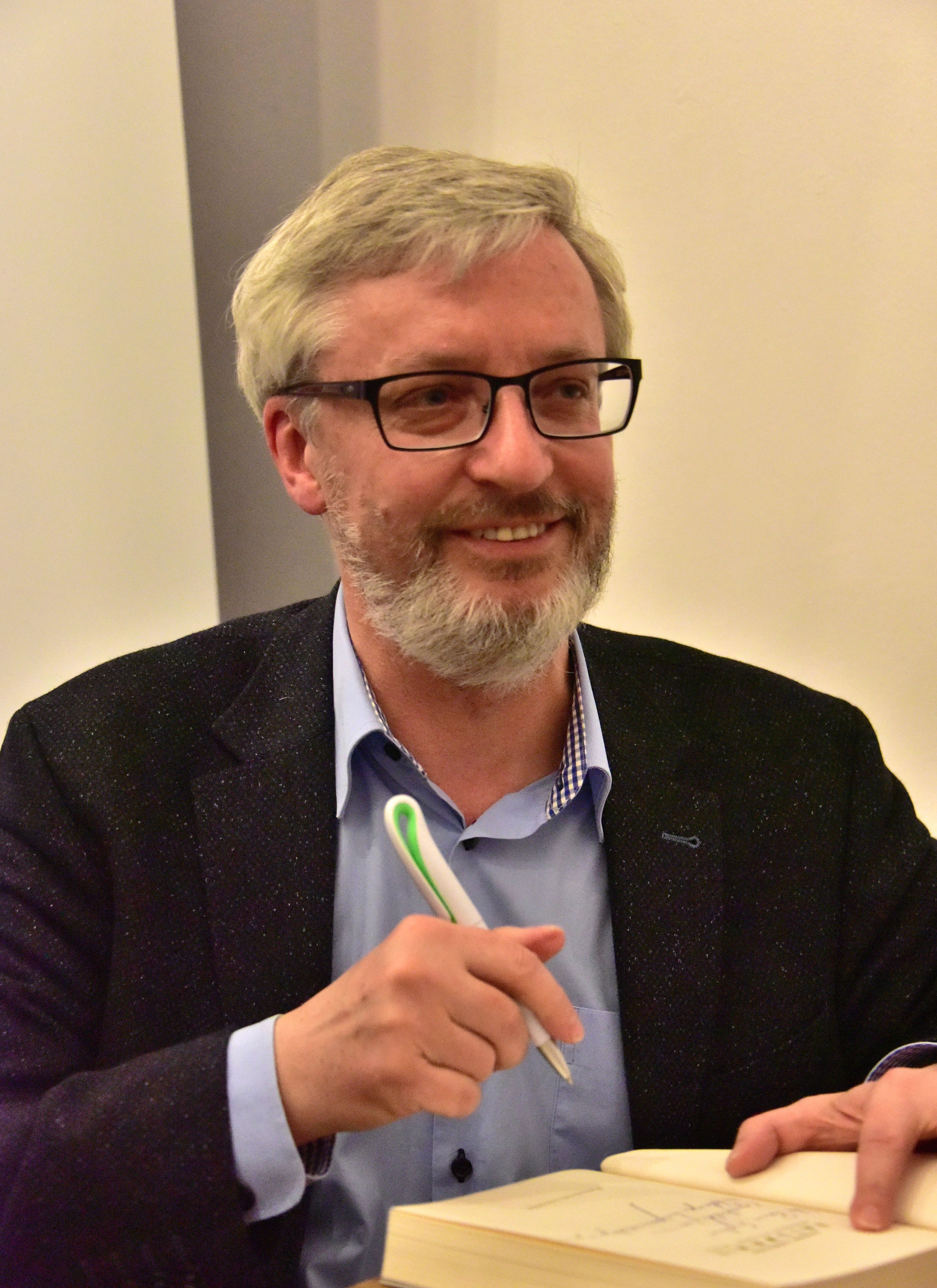 Prof. Jacek Leociak, literaturoznawca i historyk literatury.